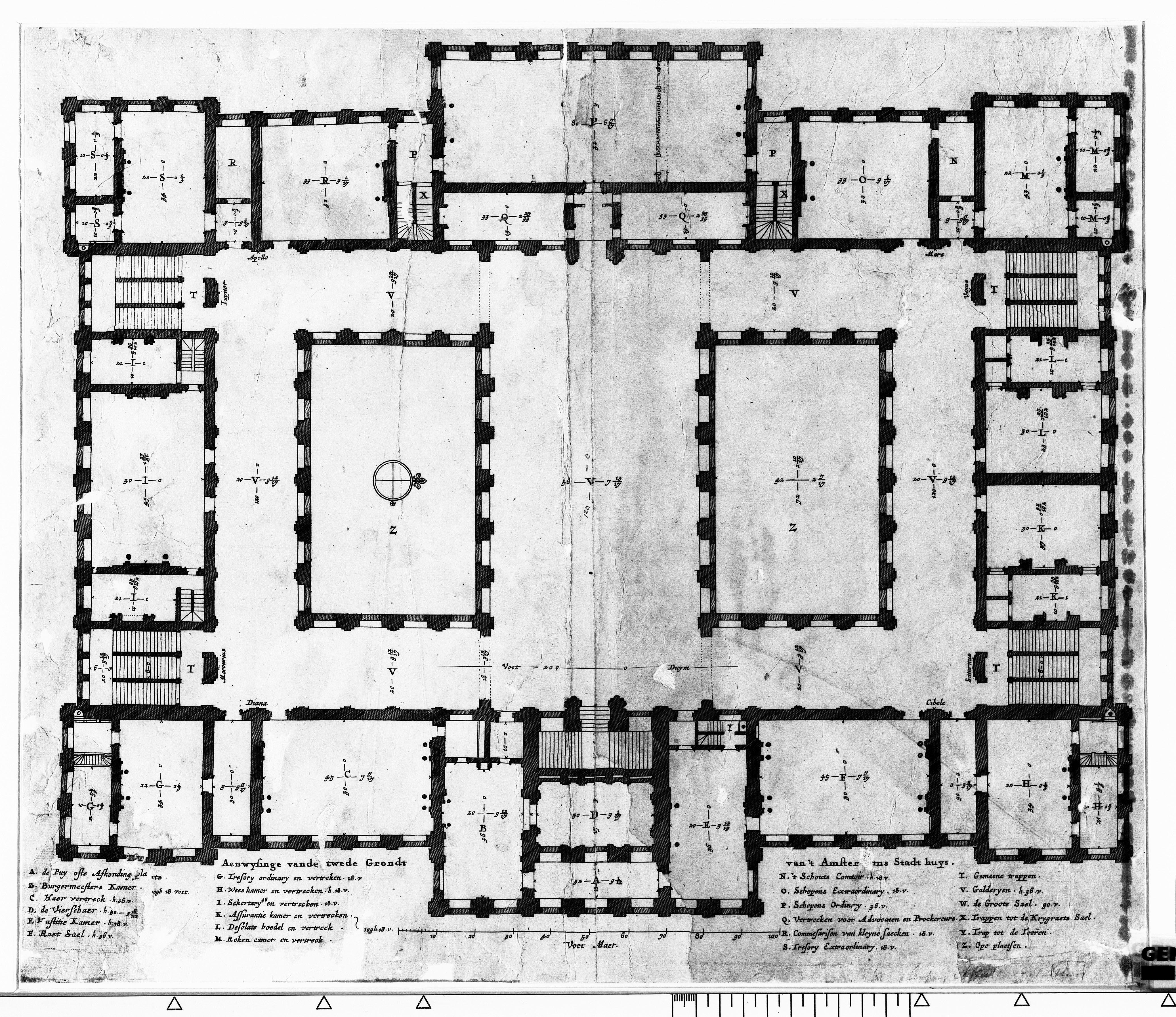 Nieuwe Stadhuis, Dam, Amsterdam, plattegrond eerste verdieping